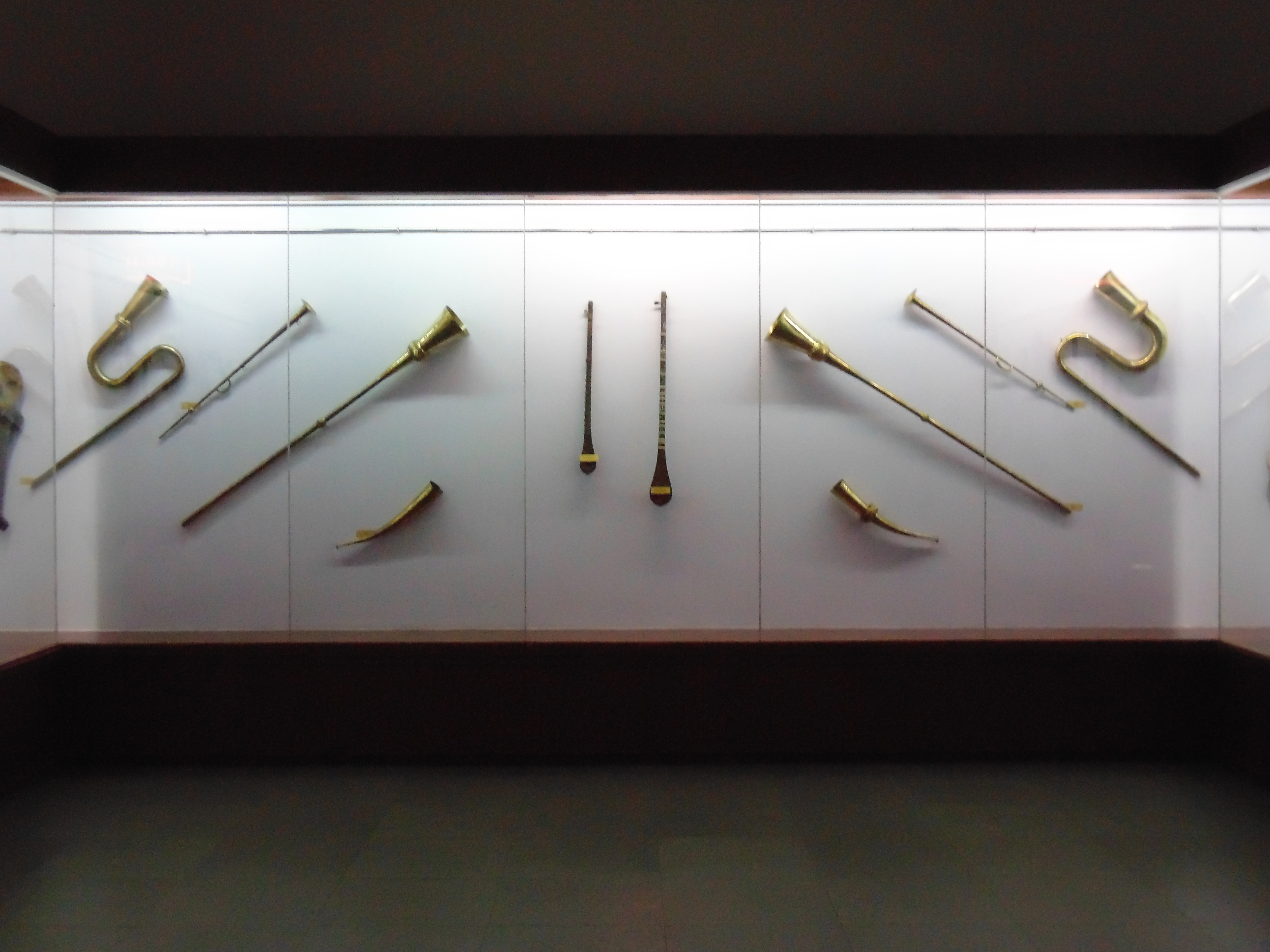 Разновидности Карная (музыкальный инструмент). Экспонаты находятся в Национальном музее Таджикистана (Душанбе)